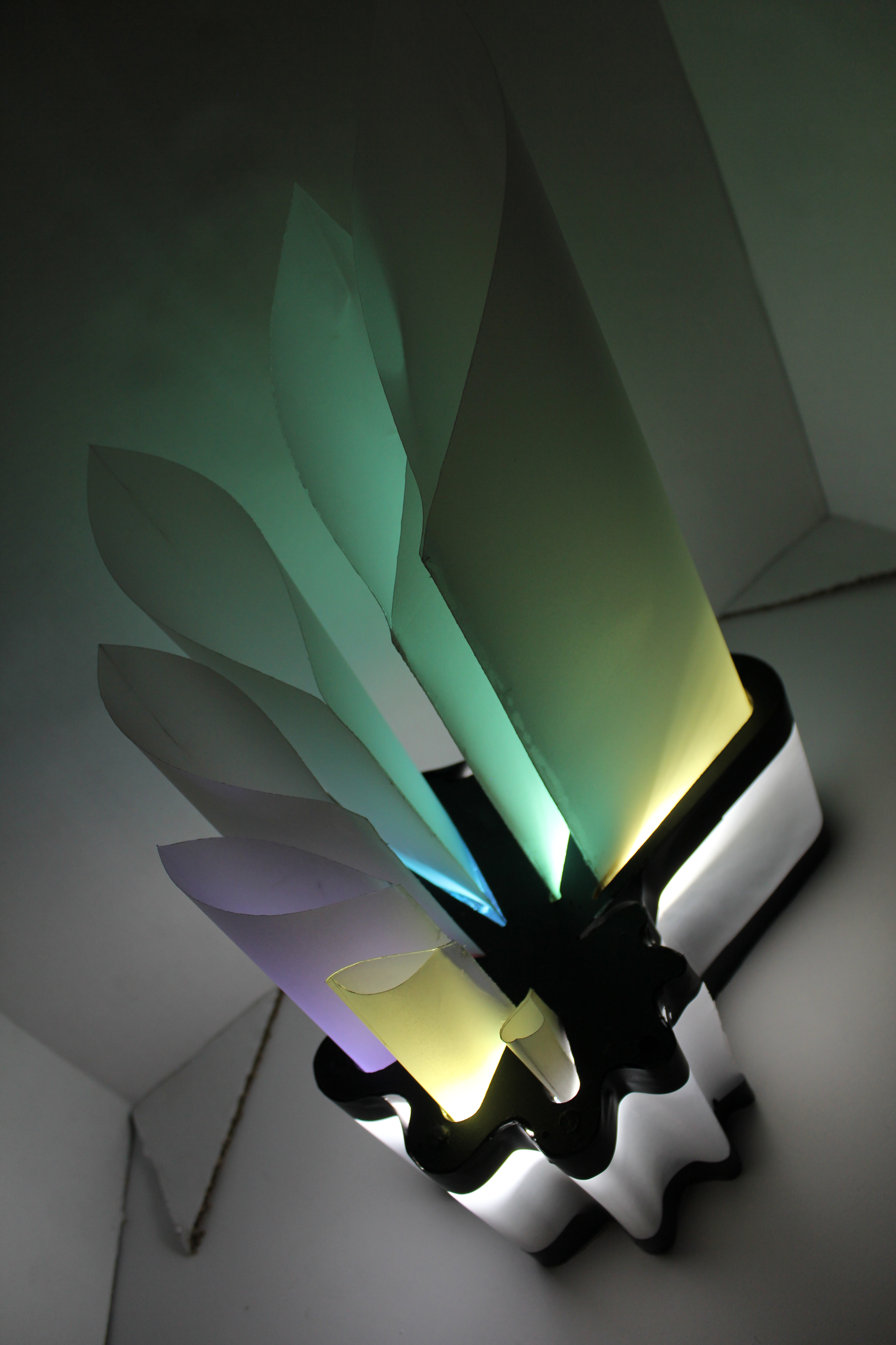 Expuesta durante el 9no SAdD